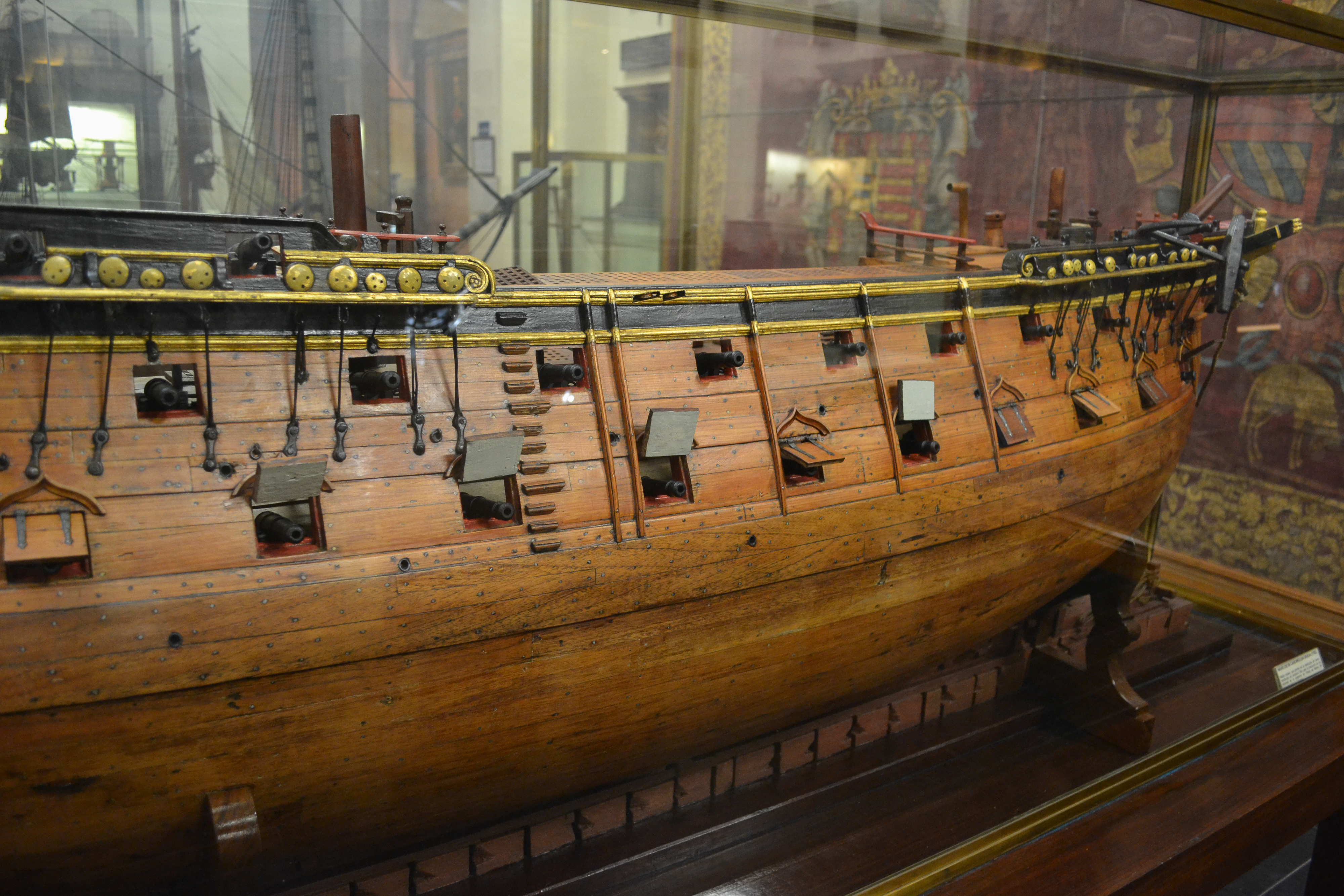 Modelo de navío de 68 cañones (1782). Construido por Jerónimo Cifre para la instrucción de los alumnos de la Academia de Pilotos de la Marina del Departamento de Cartagena. Museo Naval de Madrid.